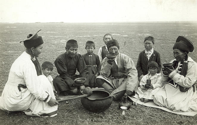 Чаепитие в степи. Калмыки. Донская область, Сальский район. Конец XIX века